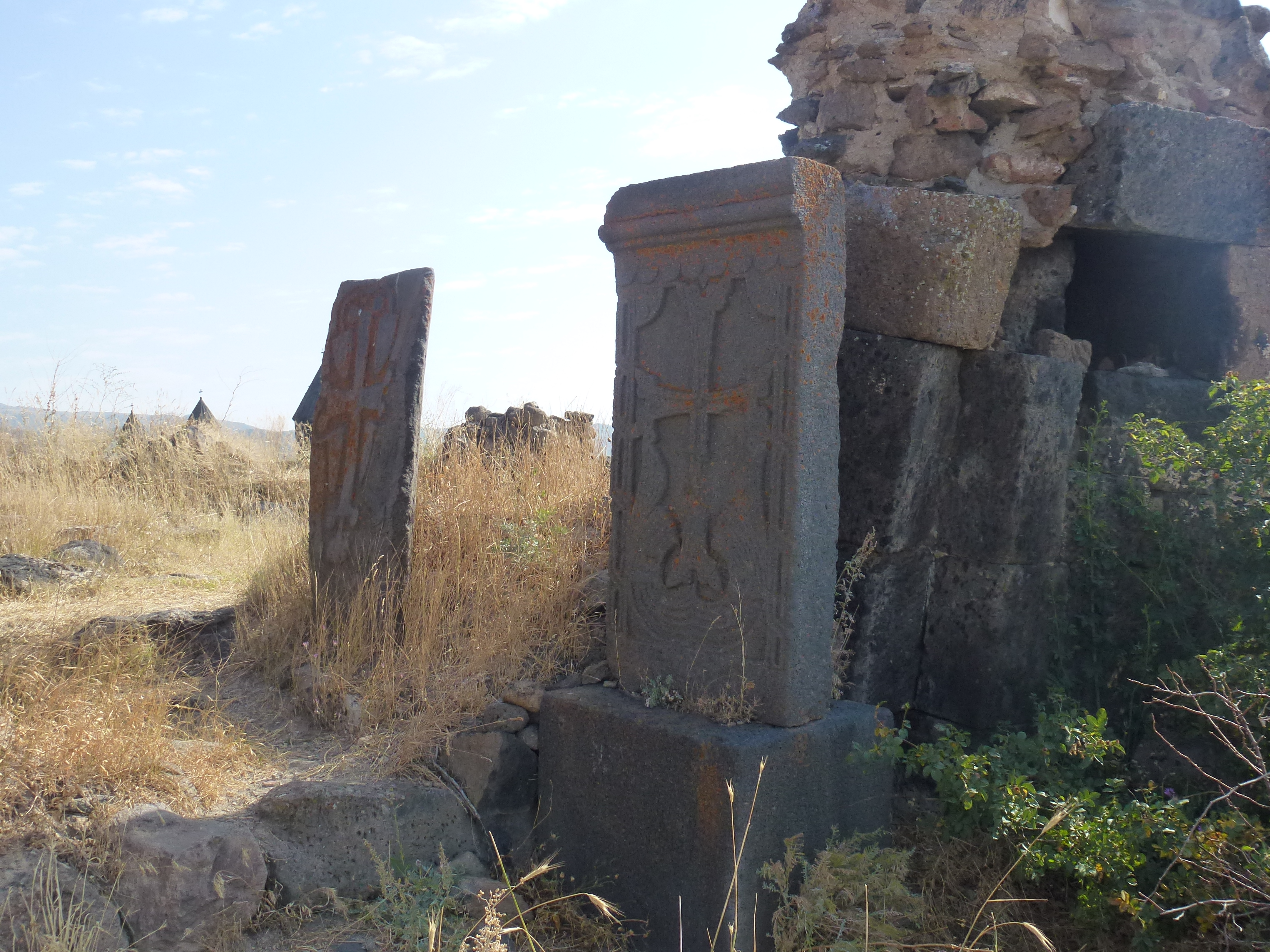 Տեղեր, Արագածոտնի մարզ, խաչքար 13 դ. 2.106/2.2 կանգնեցված` արձանագիր պատվանդանին 106/2.2